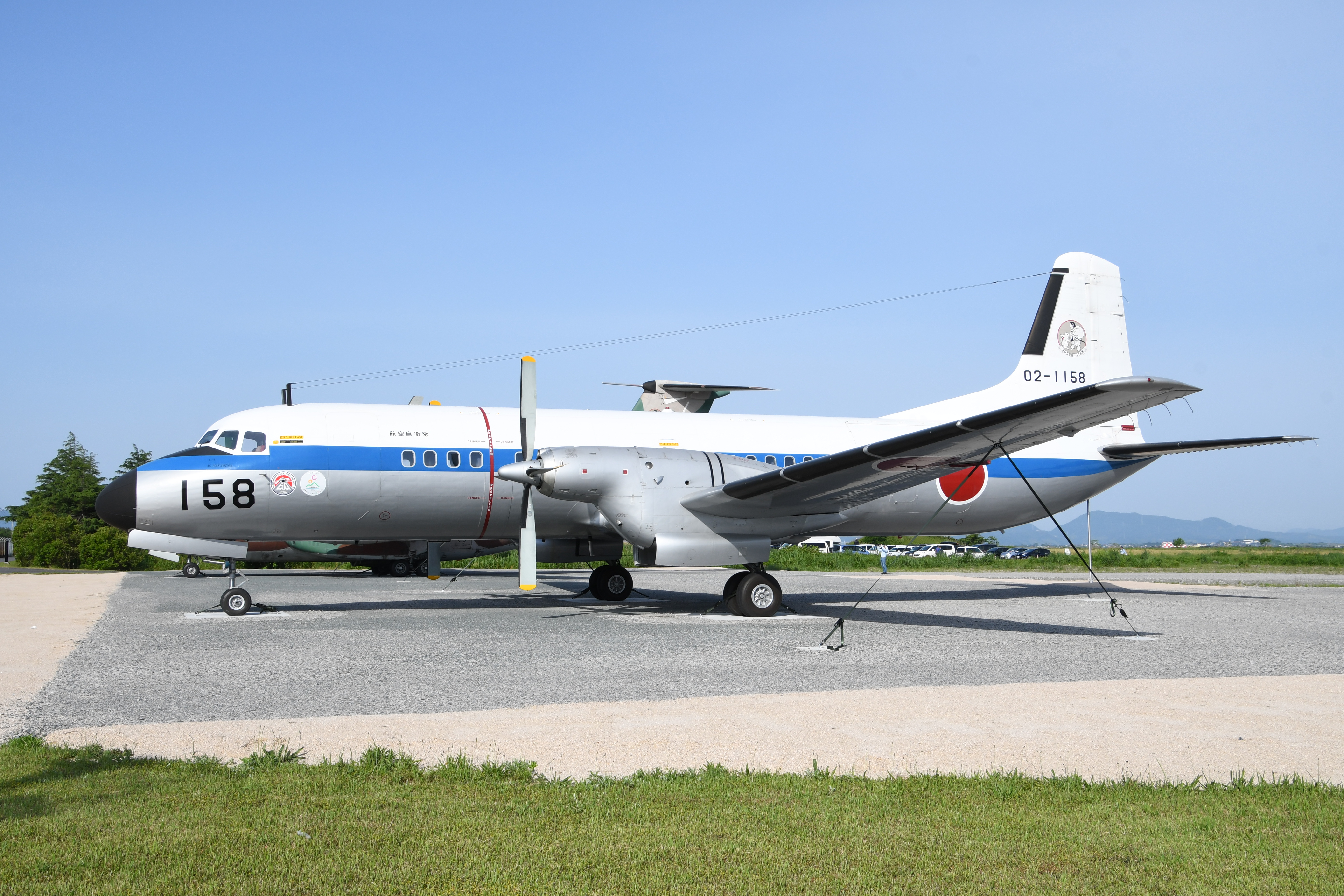 航空自衛隊 YS-11P人員輸送機（02-1158号機） 左前面。2018年5月27日 美保基地にて。